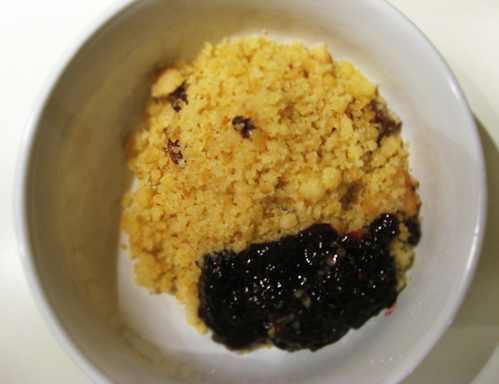 Kaiserschmarrn with jam